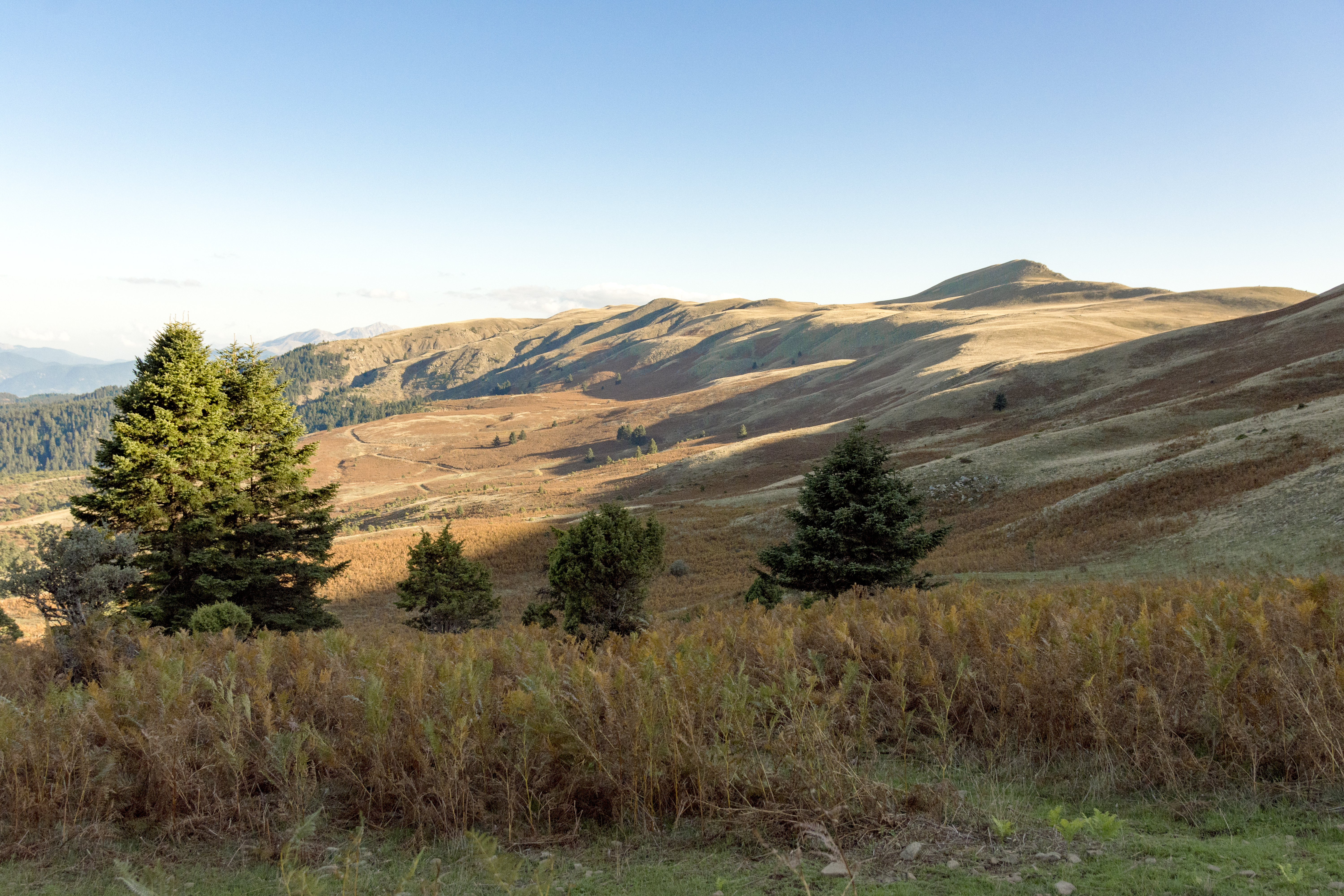 τμήμα της Σαράνταινας στην ανατολική της πλευρά πάνω από τα ορεινά χωριά Πουγκάκια και Παλαιοχώρι